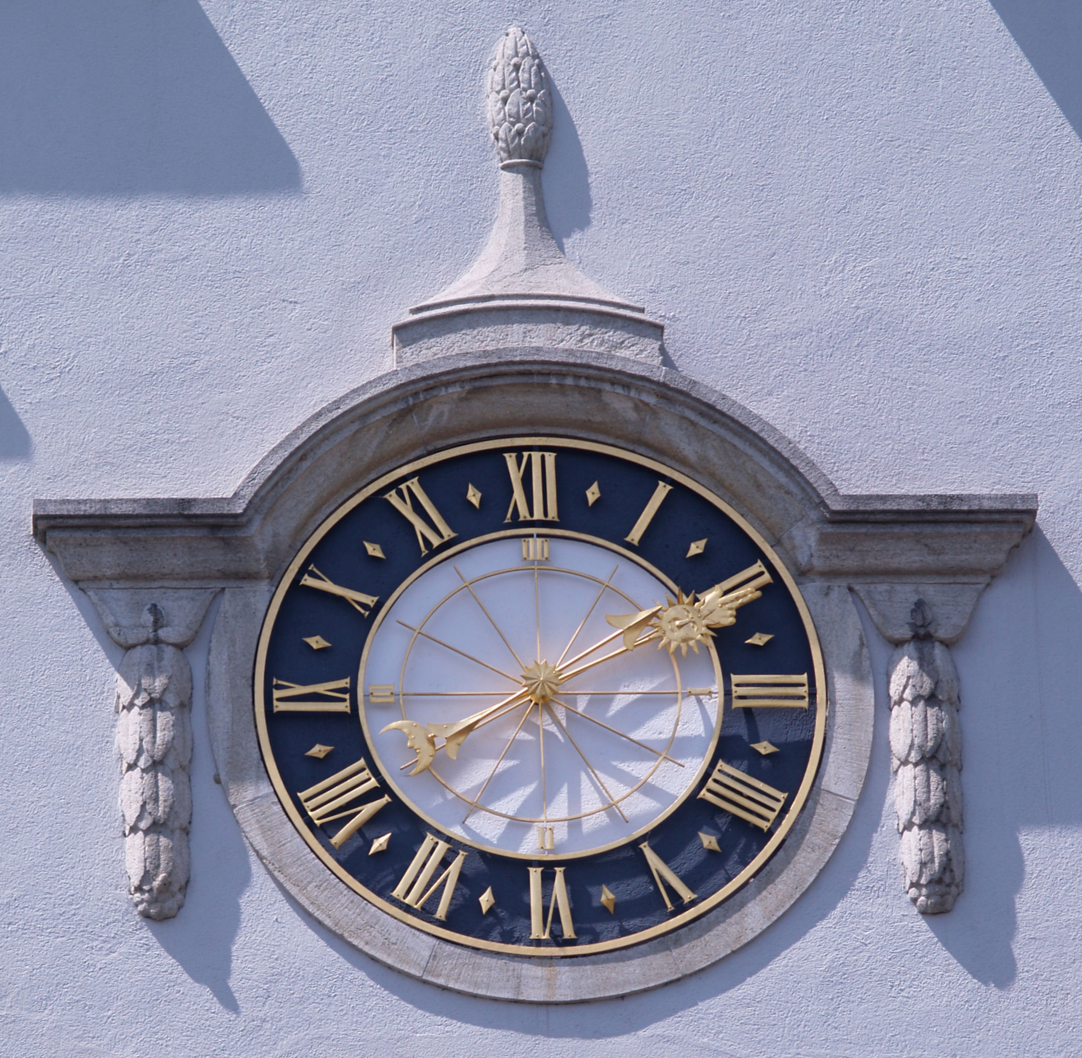 Die Uhr am Rathaus der Stadt Aarau